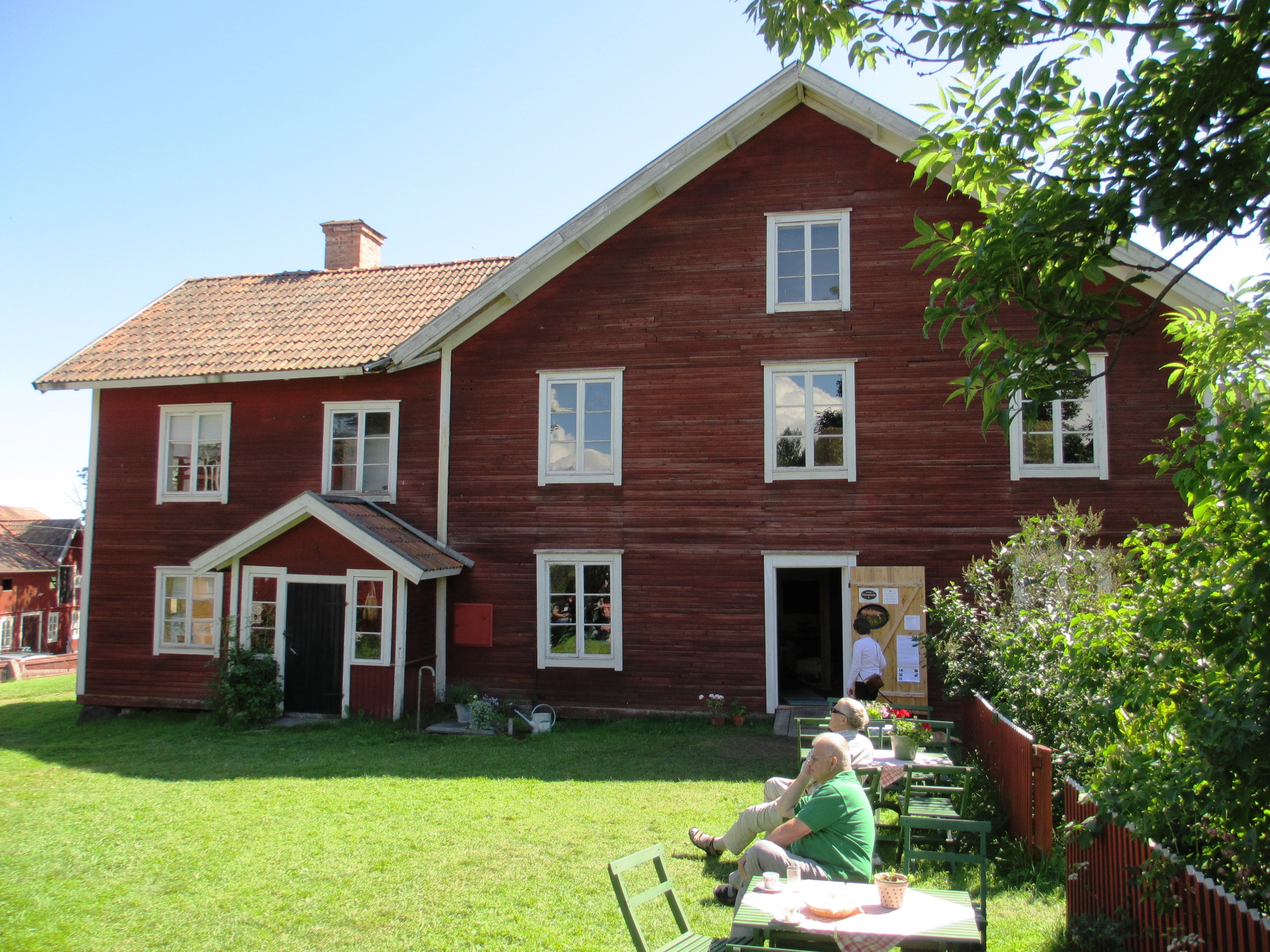 Erik-Anders i Asta, Söderala socken, Hälsingland